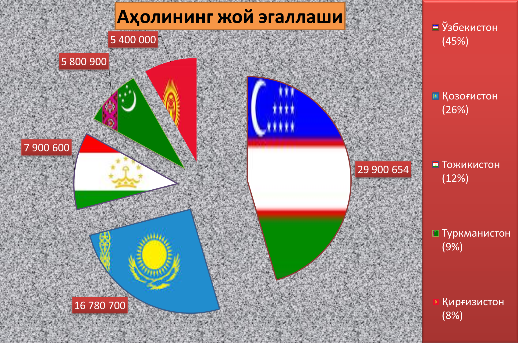 Oʻzbekcha/ўзбекча: Aholining qiyoslanishi